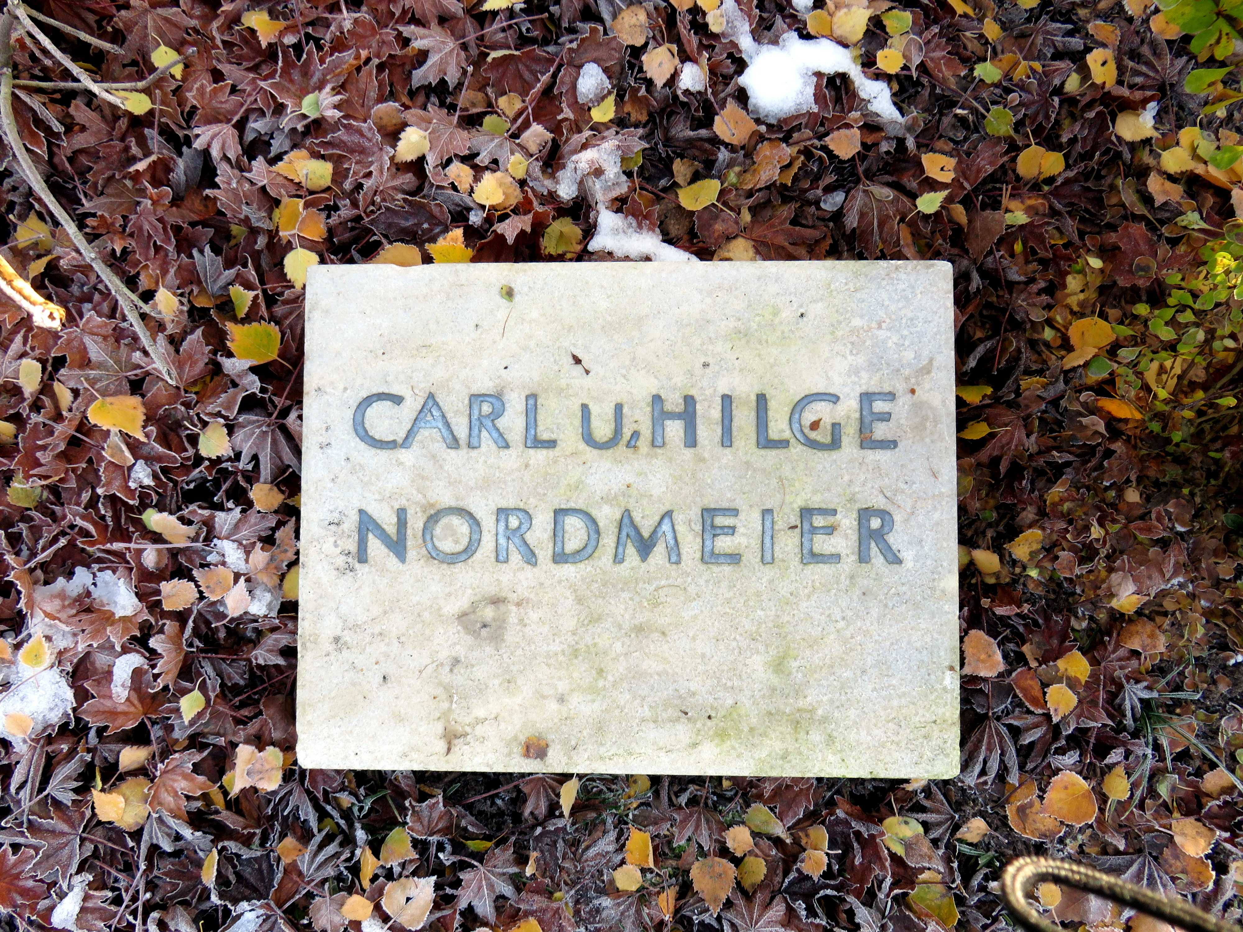 Historischer Grabstein der Hamburger Politikerin Hilge Nordmeier im Bereich des Gartens der Frauen auf dem Ohlsdorfer Friedhof in Hamburg-Ohlsdorf.